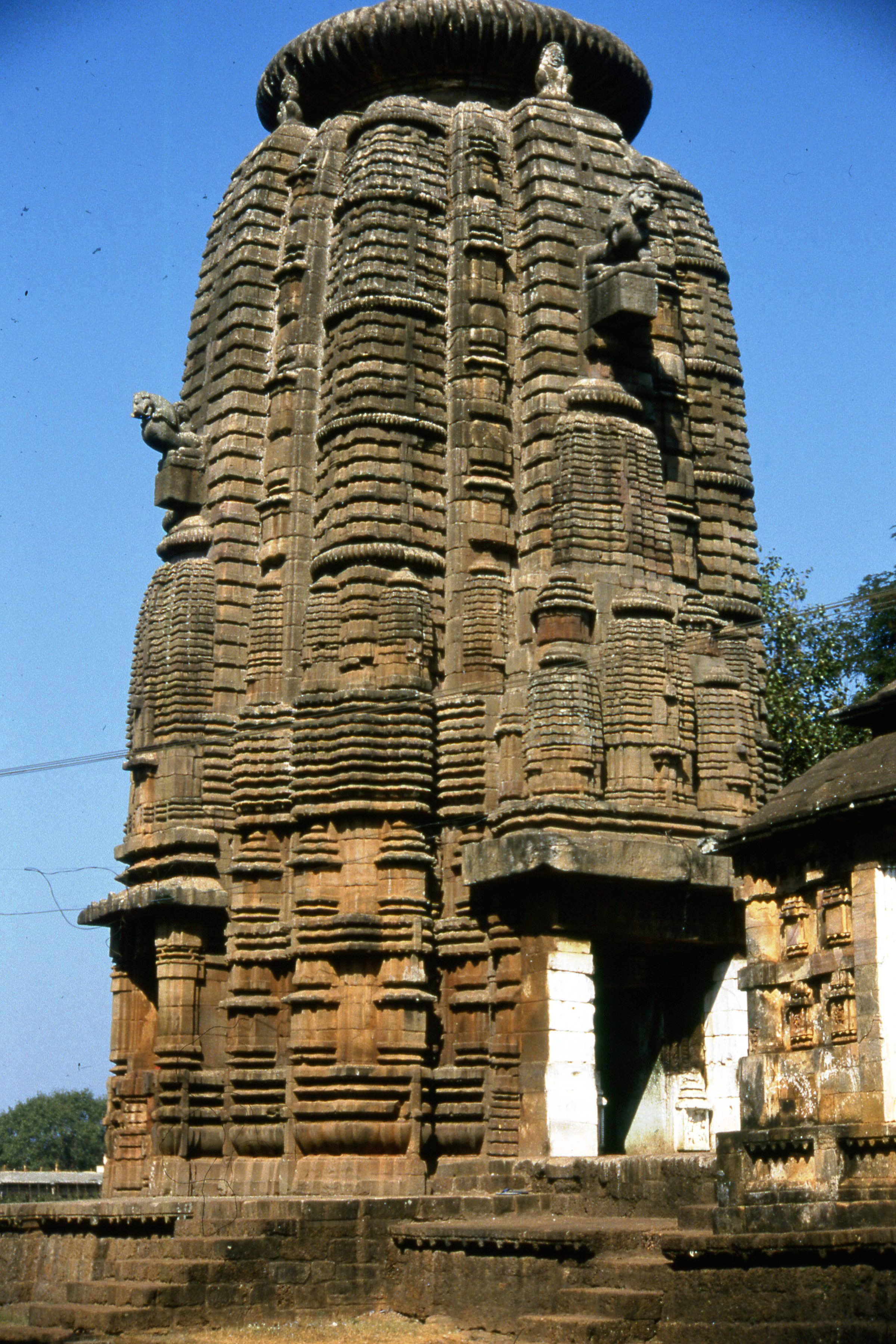 Vista lateral de una Sikhara en un templo de Orissa. Bhuvanesvar, India.